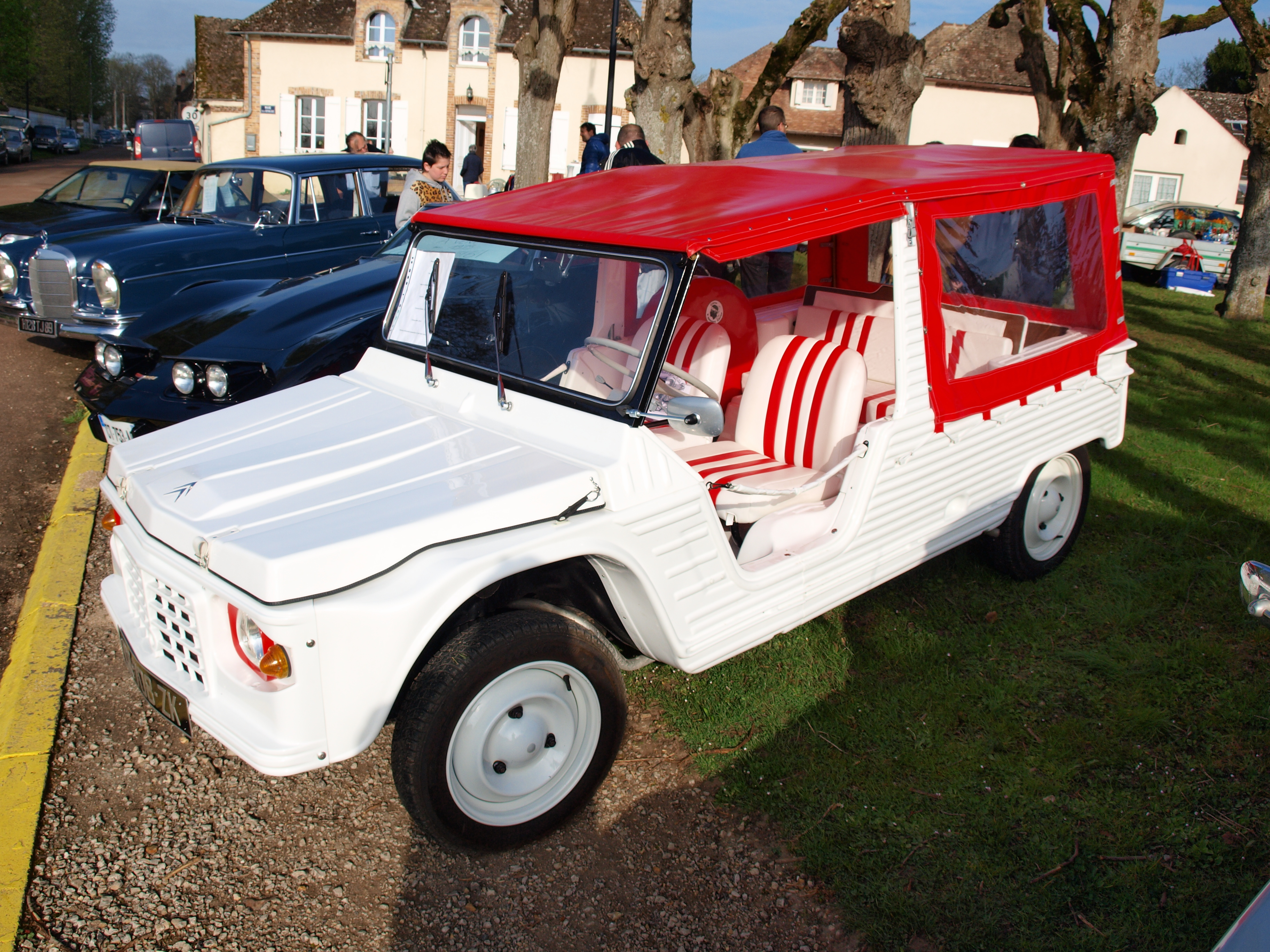 Serbonnes 5yonne, France)